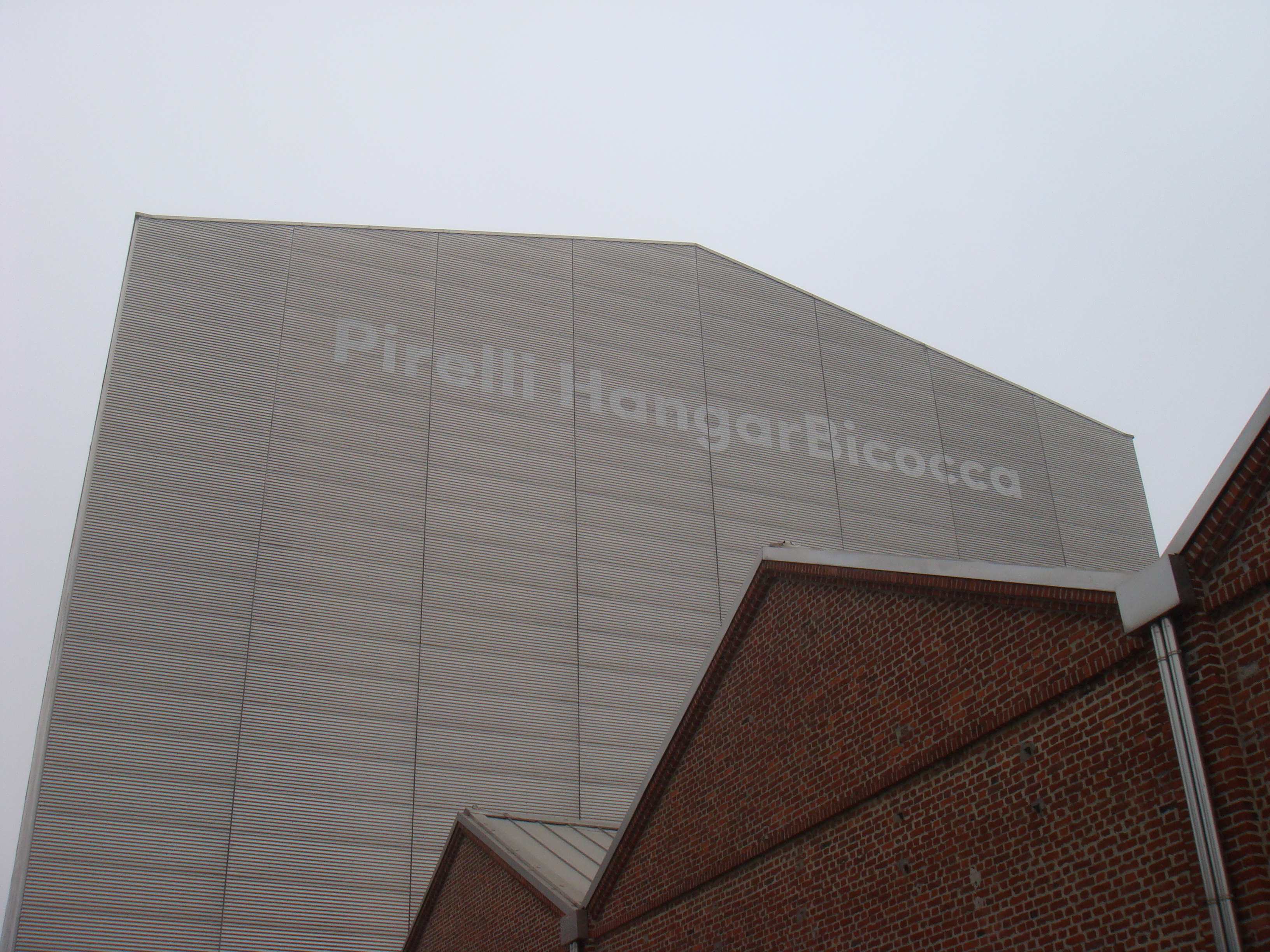 vue du haut du HangarBicocca (musée d'art moderne à Milan)